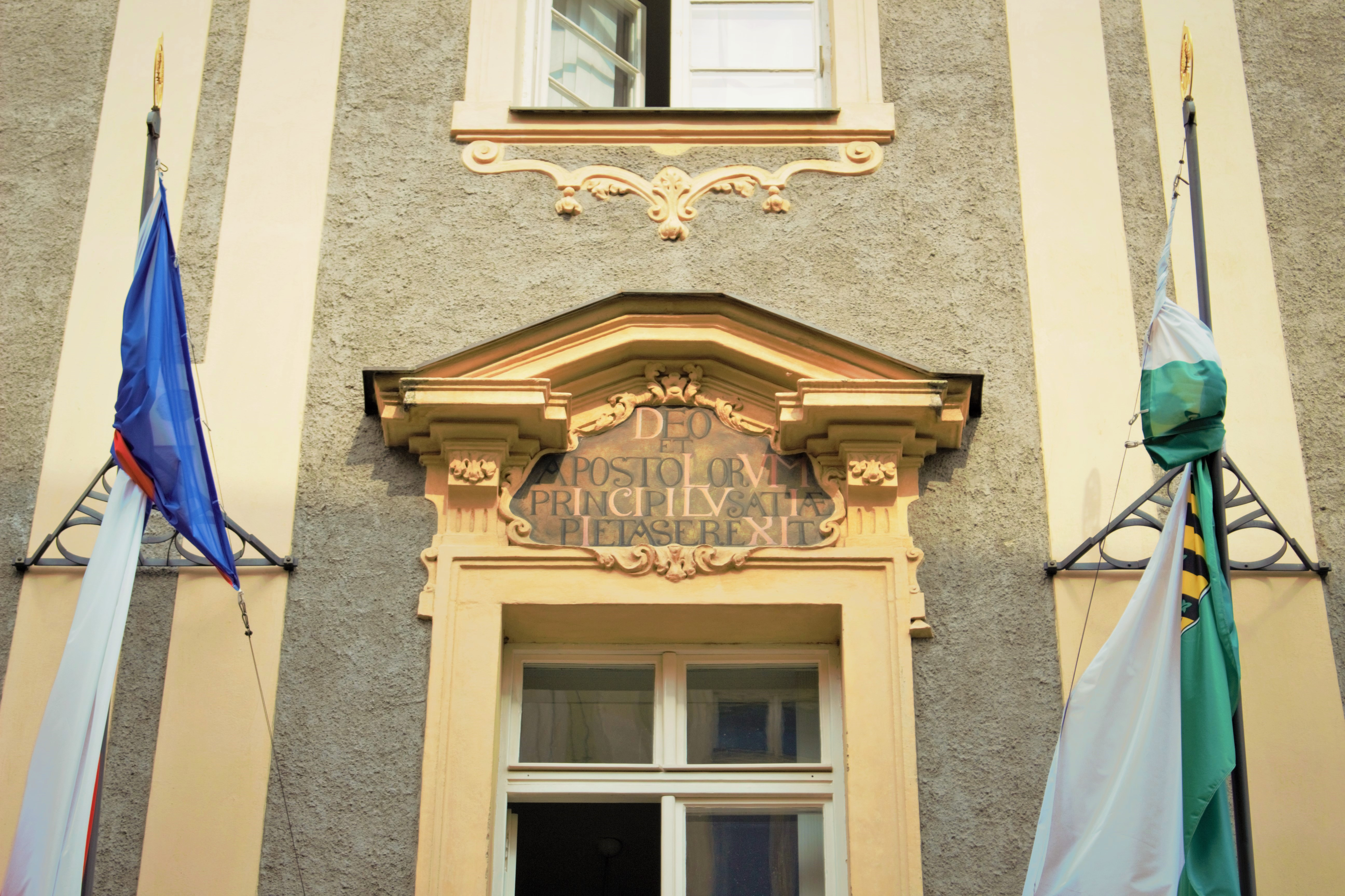 Chronogram na budově Lužického semináře.